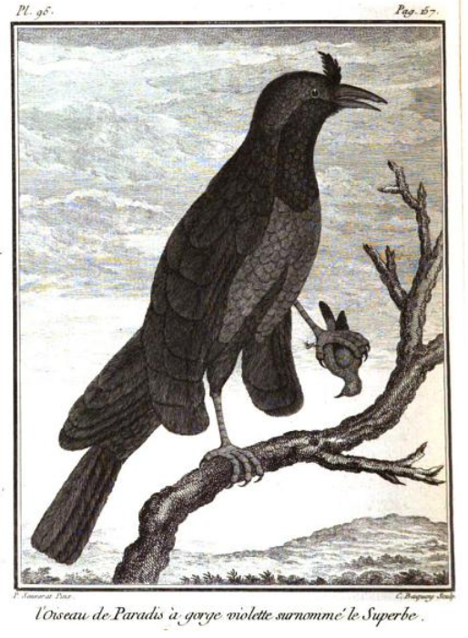 Oiseau de Paradis à gorge violette surnommé le Superbe